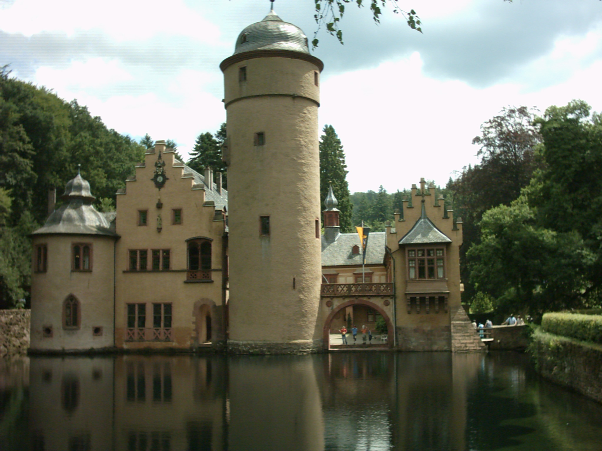 Schloss Mespelbrunn im Spessart